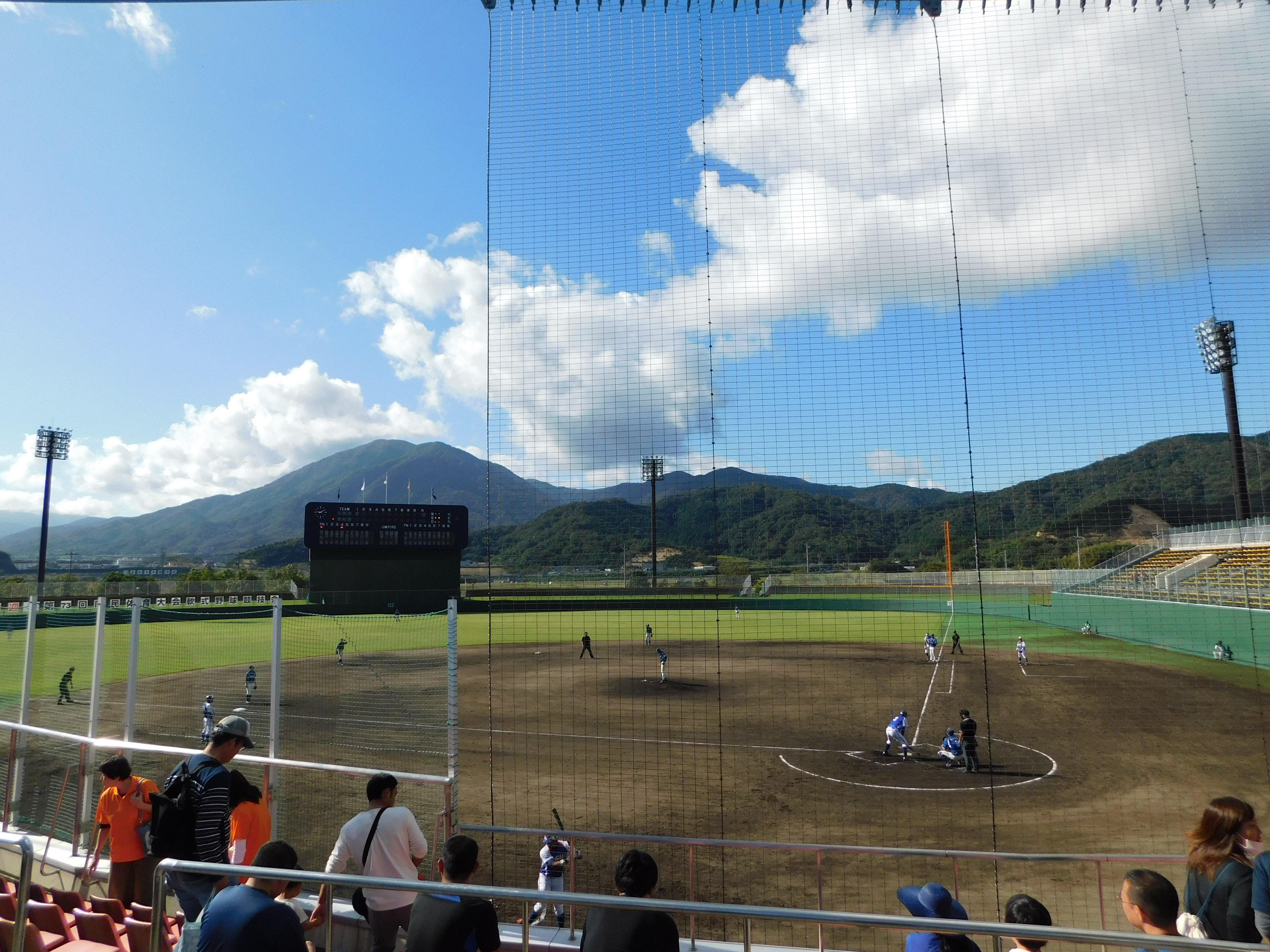 第73回国民体育大会の軟式野球の決勝戦、大阪府vs愛知県の試合。場所は福井県敦賀市総合運動公園野球場。